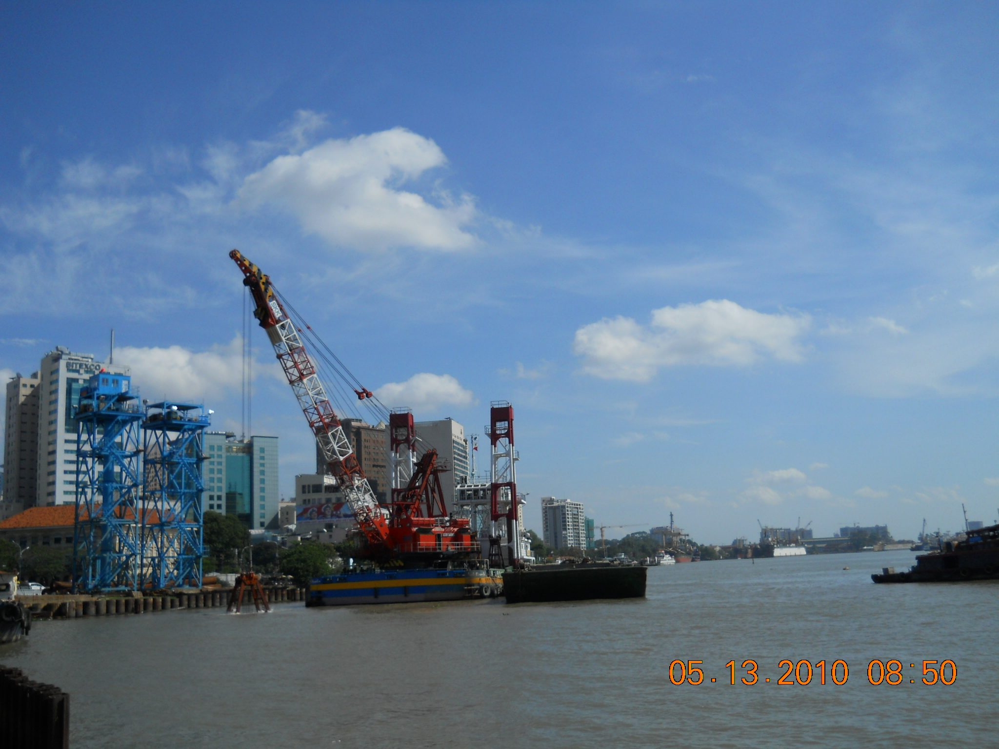 Hầm dìm Thủ Thiêm đang trong quá trình xây dựng